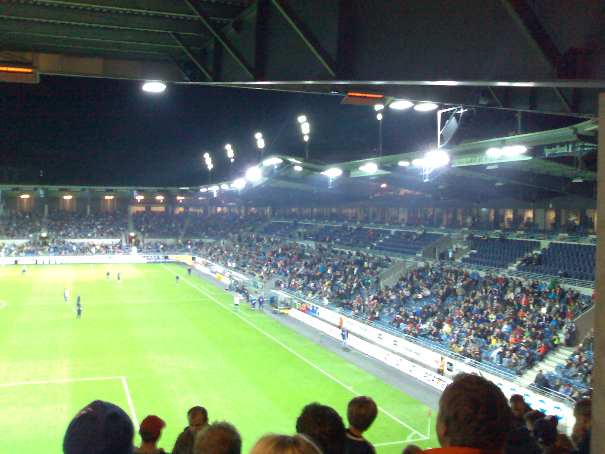 Viking stadion during match, Viking FK vs Strømsgodset